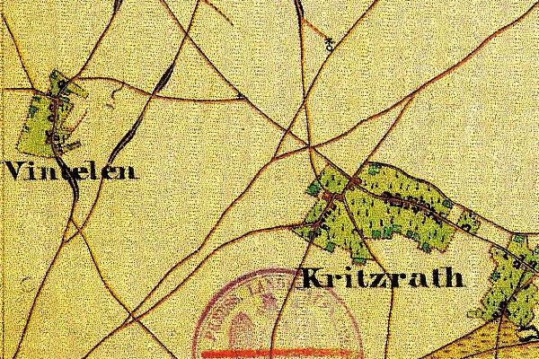 Preußische Kartenaufnahme 1846 -Uraufnahme- (Gangelt)